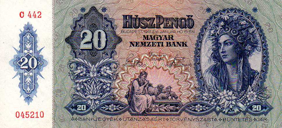 20 Hungarian pengő (1941) - obverse